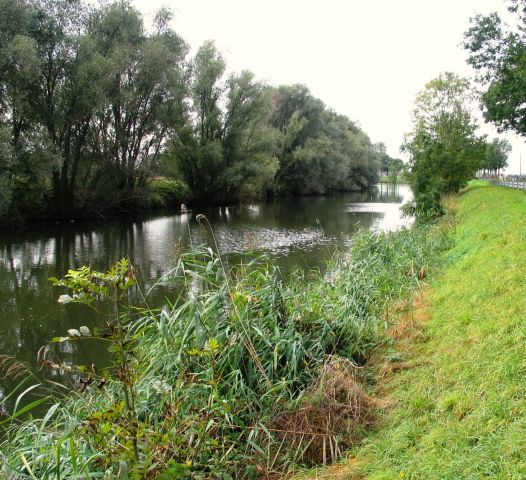 IJzer (rivier) - eigen foto